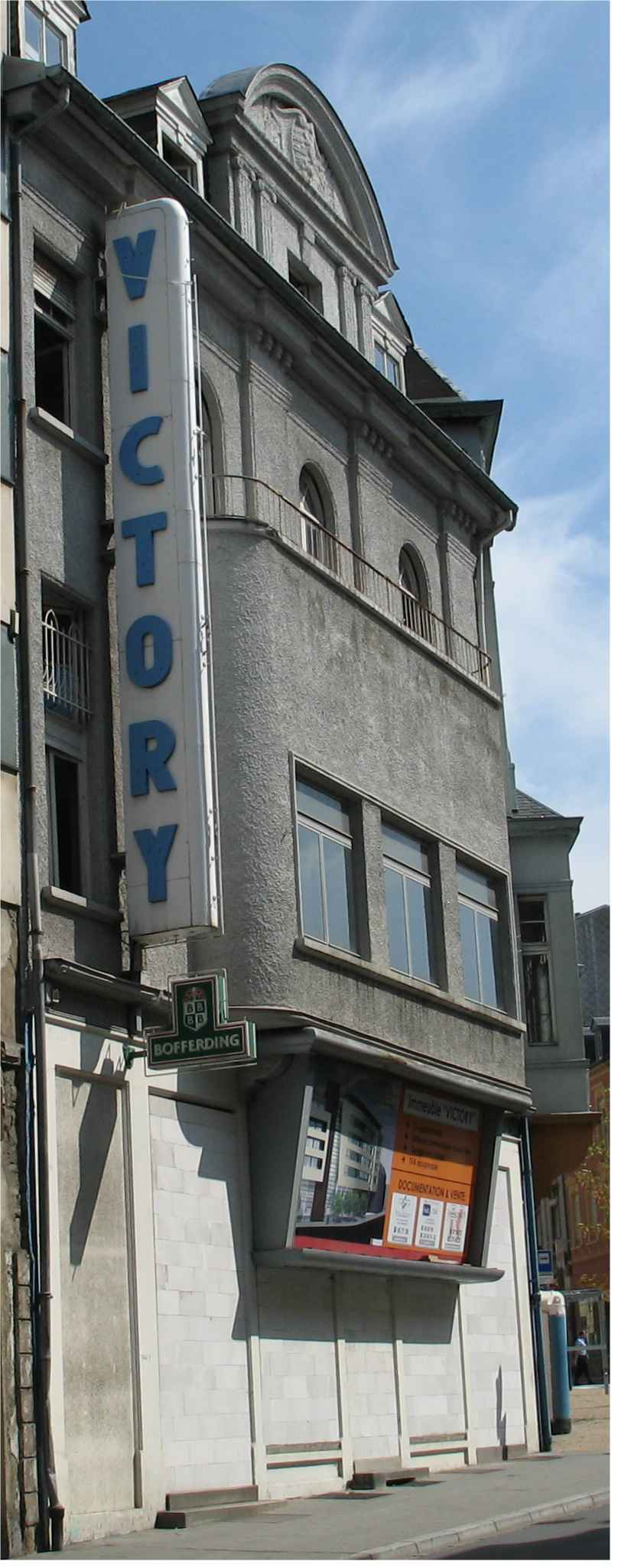 D'Gebai vum Victory am Joer 2005